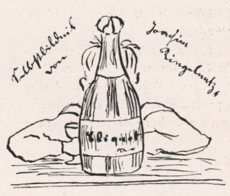 Scan der Zeichnung von Ringelnatz aus der Zeitschrift „Der Querschnitt“ erschienen im Verlag von Holten, 1.Aprl 1925